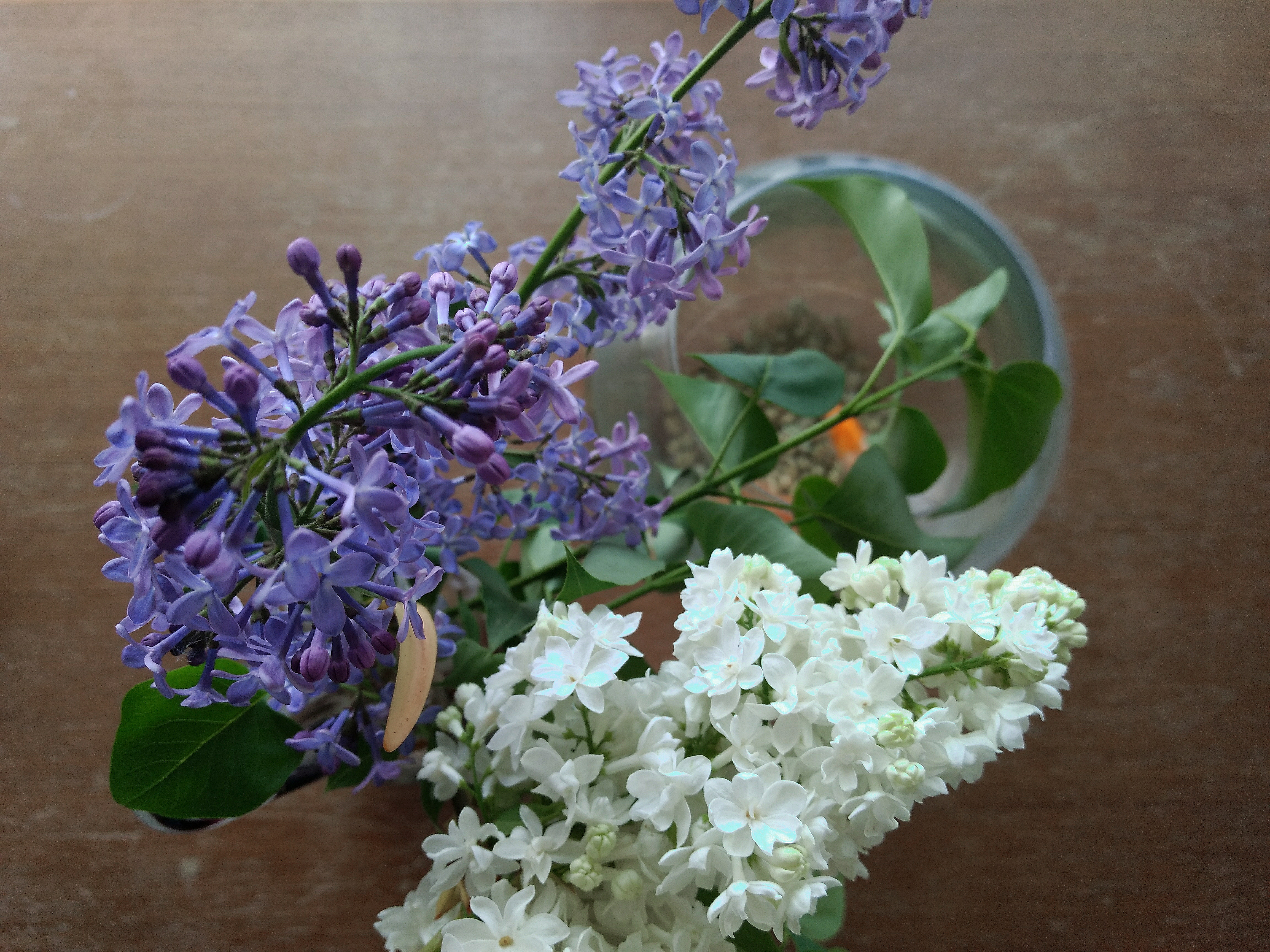 Виолетов и бел јоргован